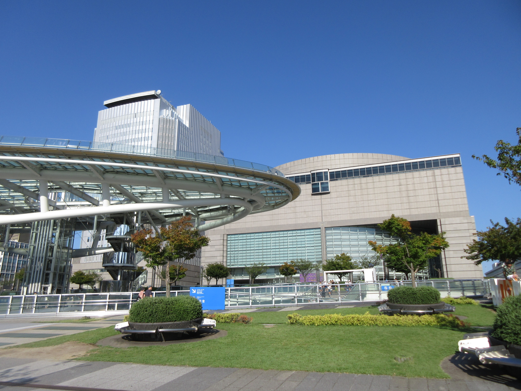 愛知芸術文化センターとオアシス21（名古屋市東区東桜）